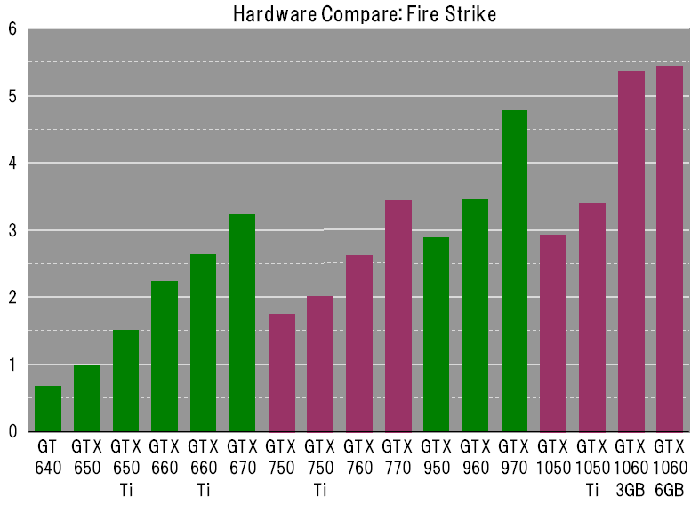 ミドルレンジの性能比較